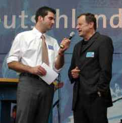 Achim Exner und Peter Kunz bei einer Wahlkampfveranstaltung in Wiesbaden